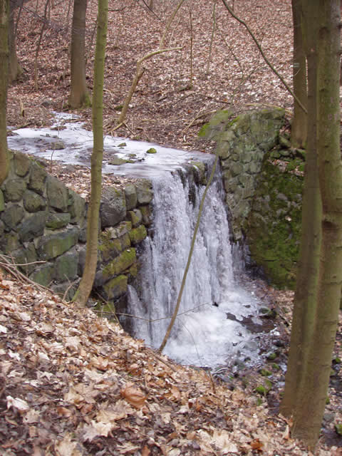 Průčelský potok